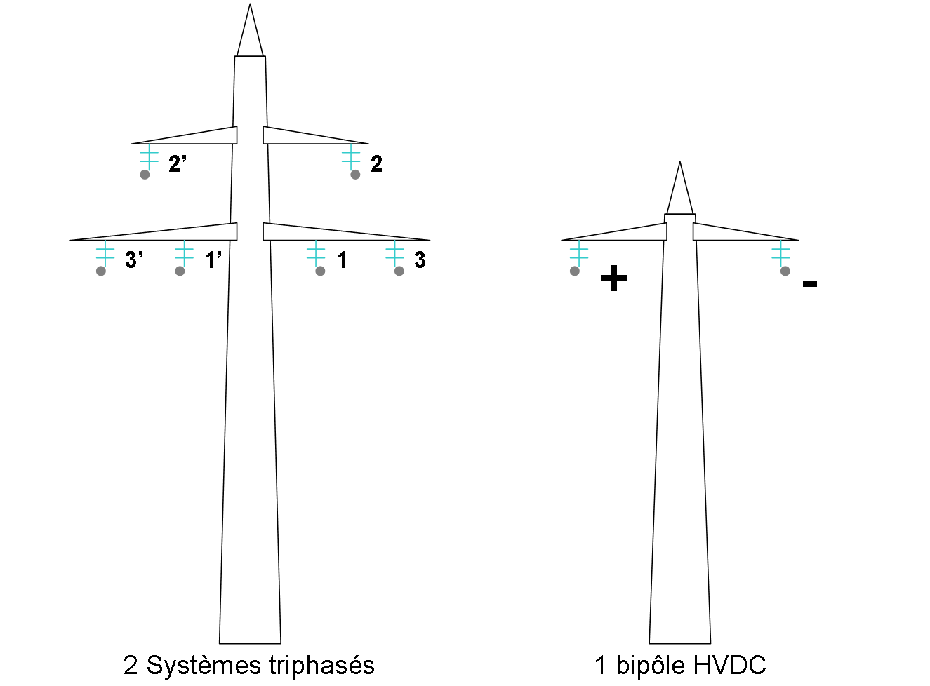 Ligne triphasée comparée à une ligne en courant continu